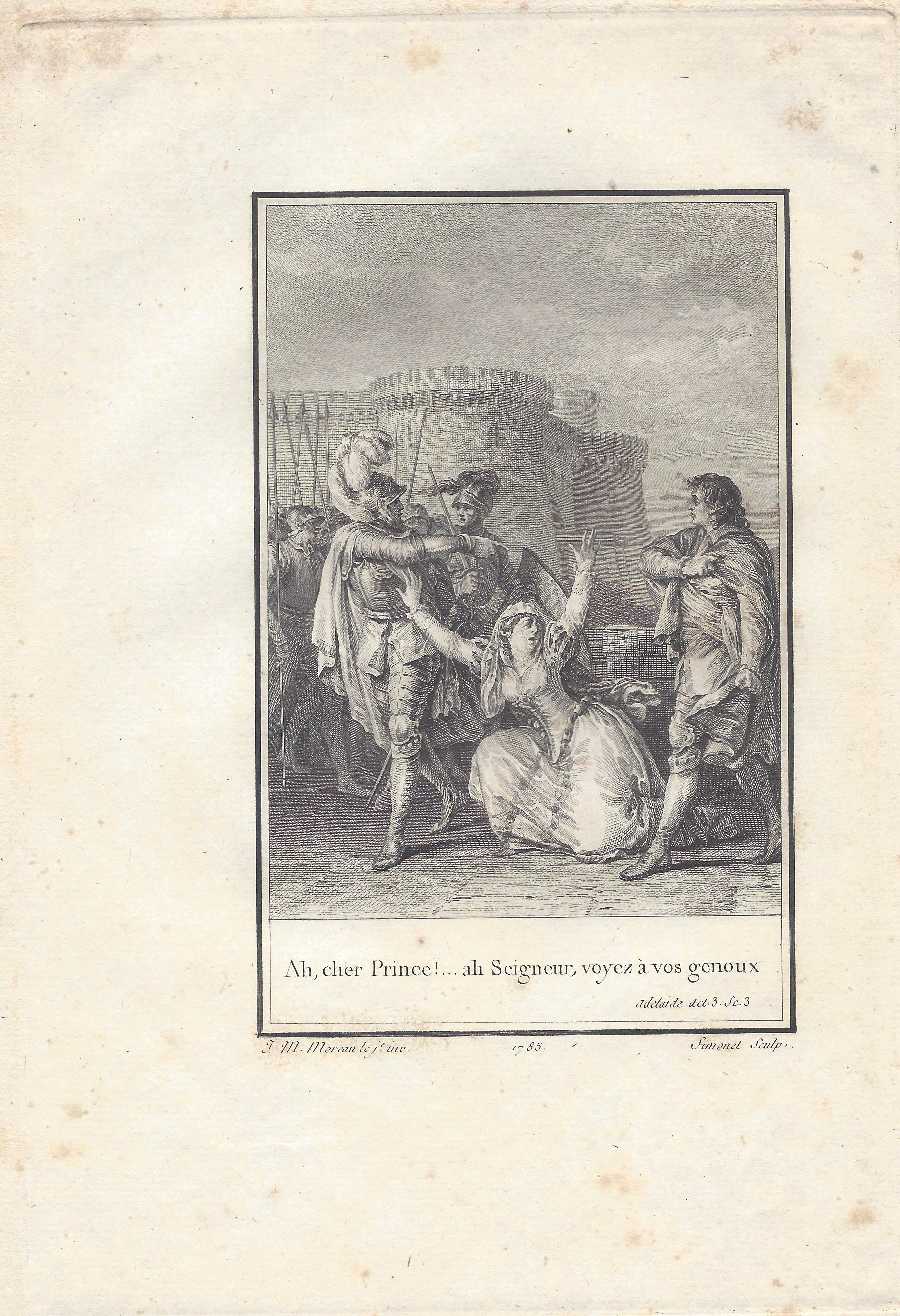 Voltaire: Adelaide Akt 3 Szene 3 Kupferstich von Jean-Baptiste Simonet nach Jean-Michel Moreau